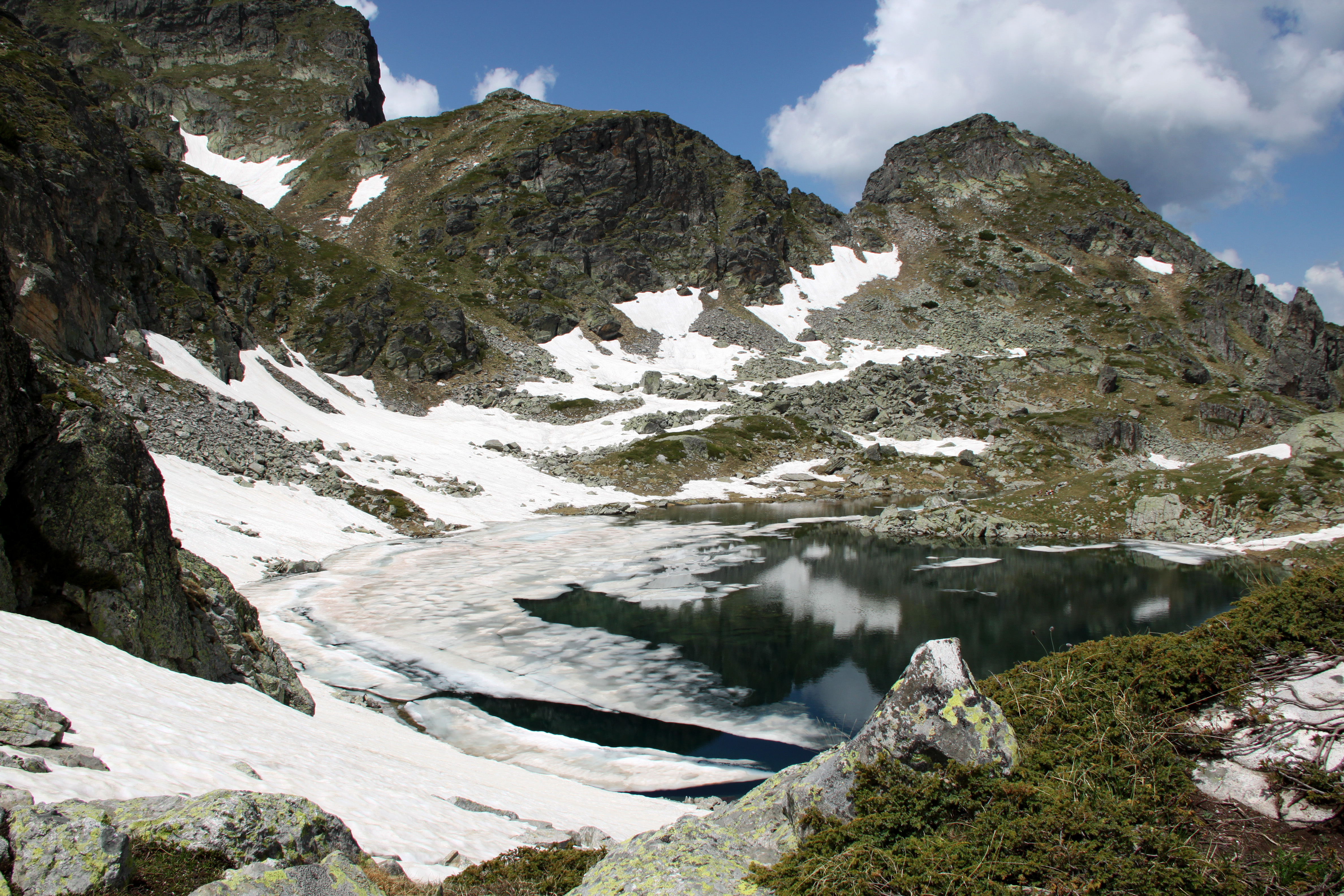 Рила, Рила